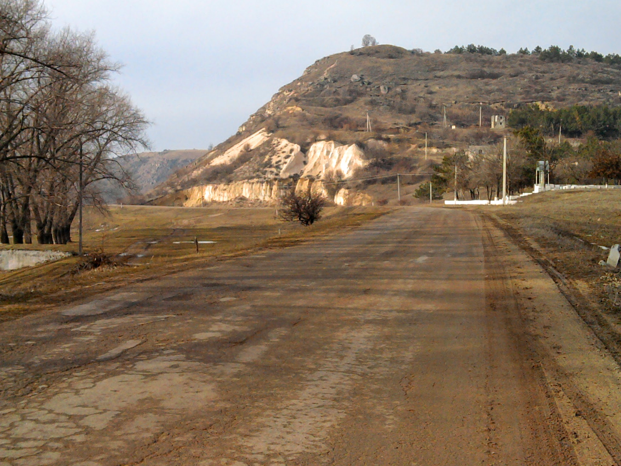 Drumul Central din Mascauti, Maşcăuţi, Moldova